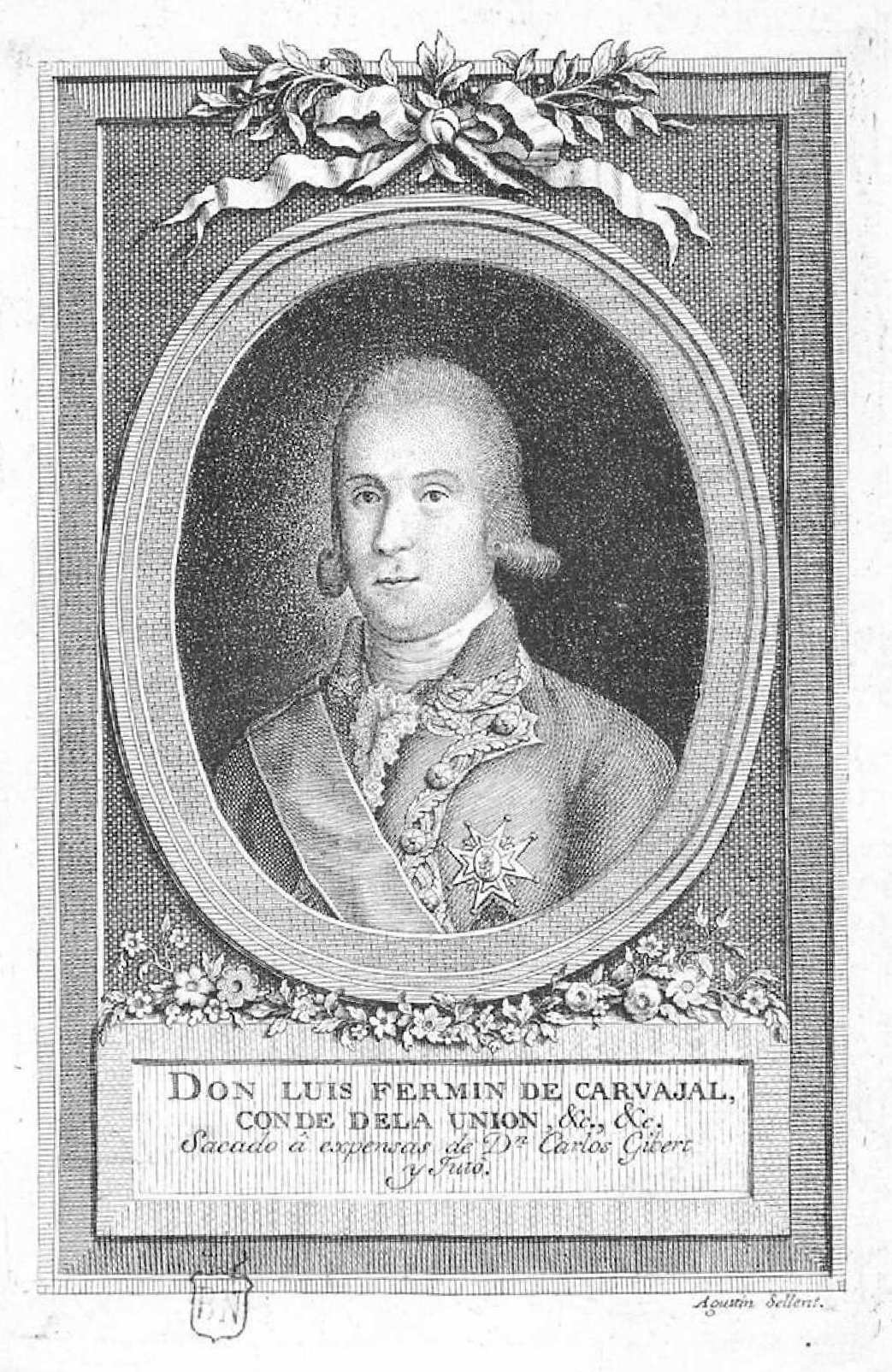 Retrato de Luis Fermín de Carvajal y Vargas, estampa calcográfica. Biblioteca Nacional de España